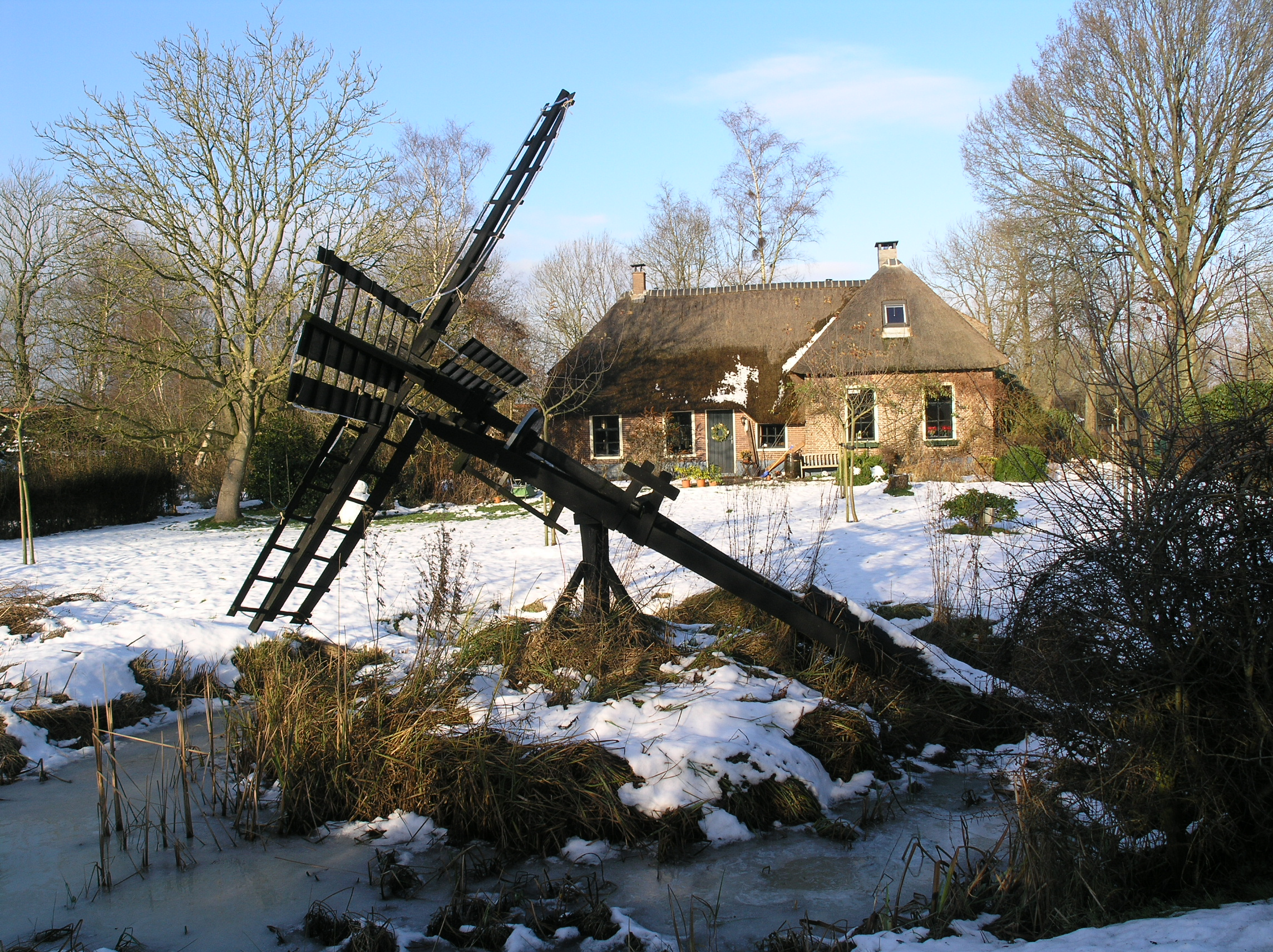 Tjasker Giethoorn Noord